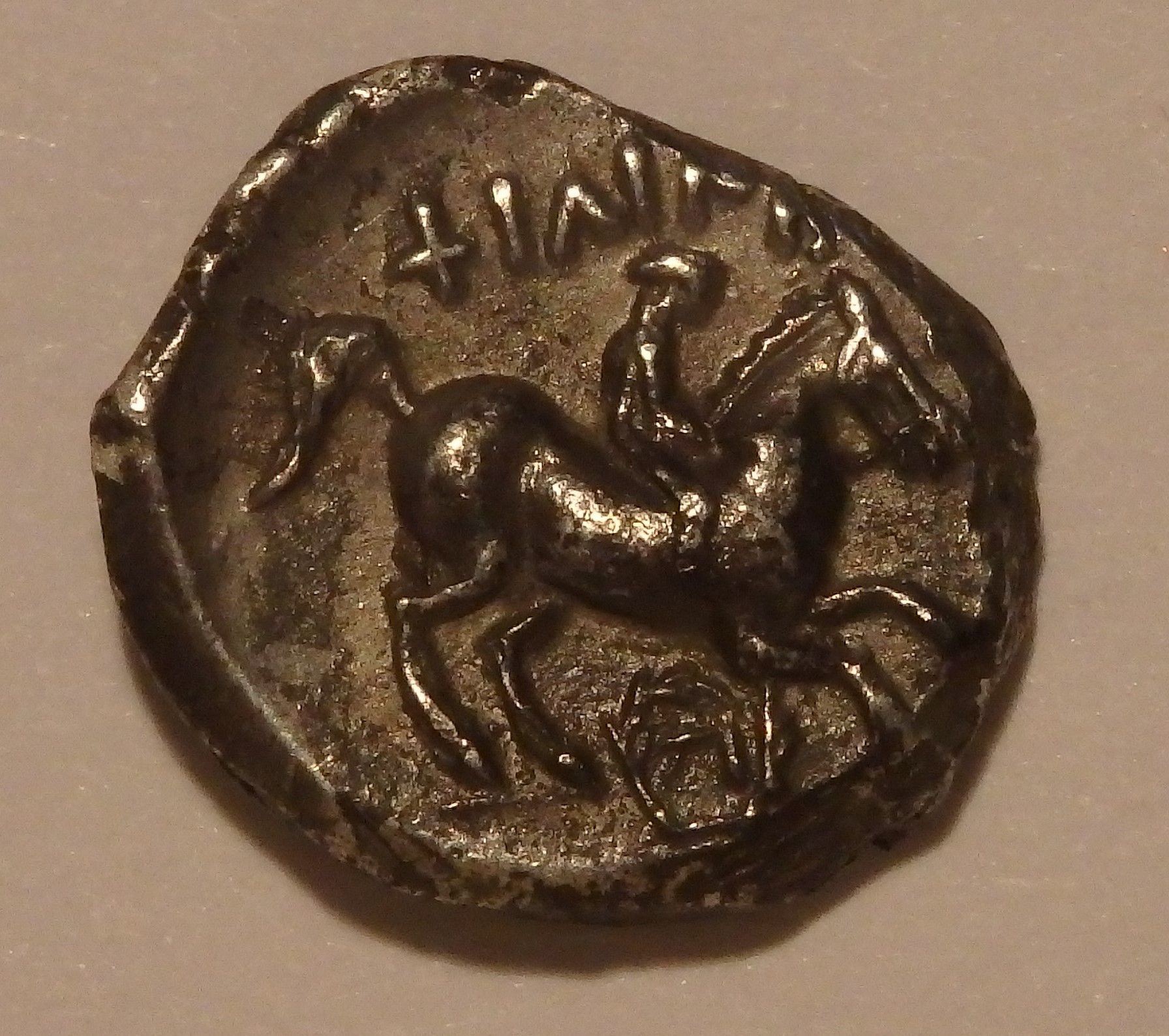 Tetrobol von Philipp mit Reiter auf Rückseite, vgl. Szaivert/Sear, Nr. 6825